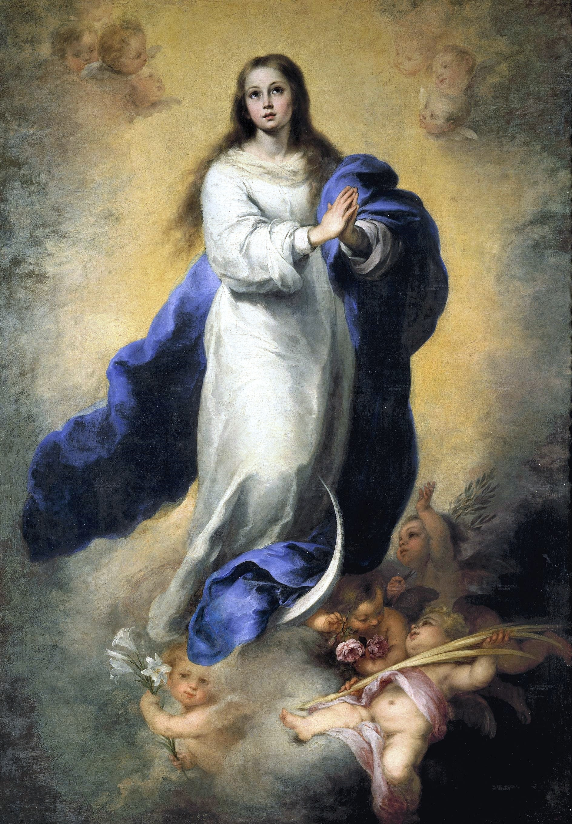 Esta obra es una de las Inmaculadas de Bartolomé Esteban Murillo con aspecto más juvenil, lo que la vincula con la tradición sevillana del también pintor sevillano Francisco de Zurbarán, y con las recomendaciones sobre la representación de este tema manifestadas por Francisco Pacheco en su Arte de la pintura, que escribió en 1649. Además, hay varios dibujos preparatorios para esta obra ejecutados por Murillo, lo que demuestra que el pintor sevillano se preparó concienzudamente para ejecutarla, y es conocida como Inmaculada del Escorial porque aparece citada por primera vez en las colecciones reales del monasterio de El Escorial en 1788, durante el reinado de Carlos IV de España.